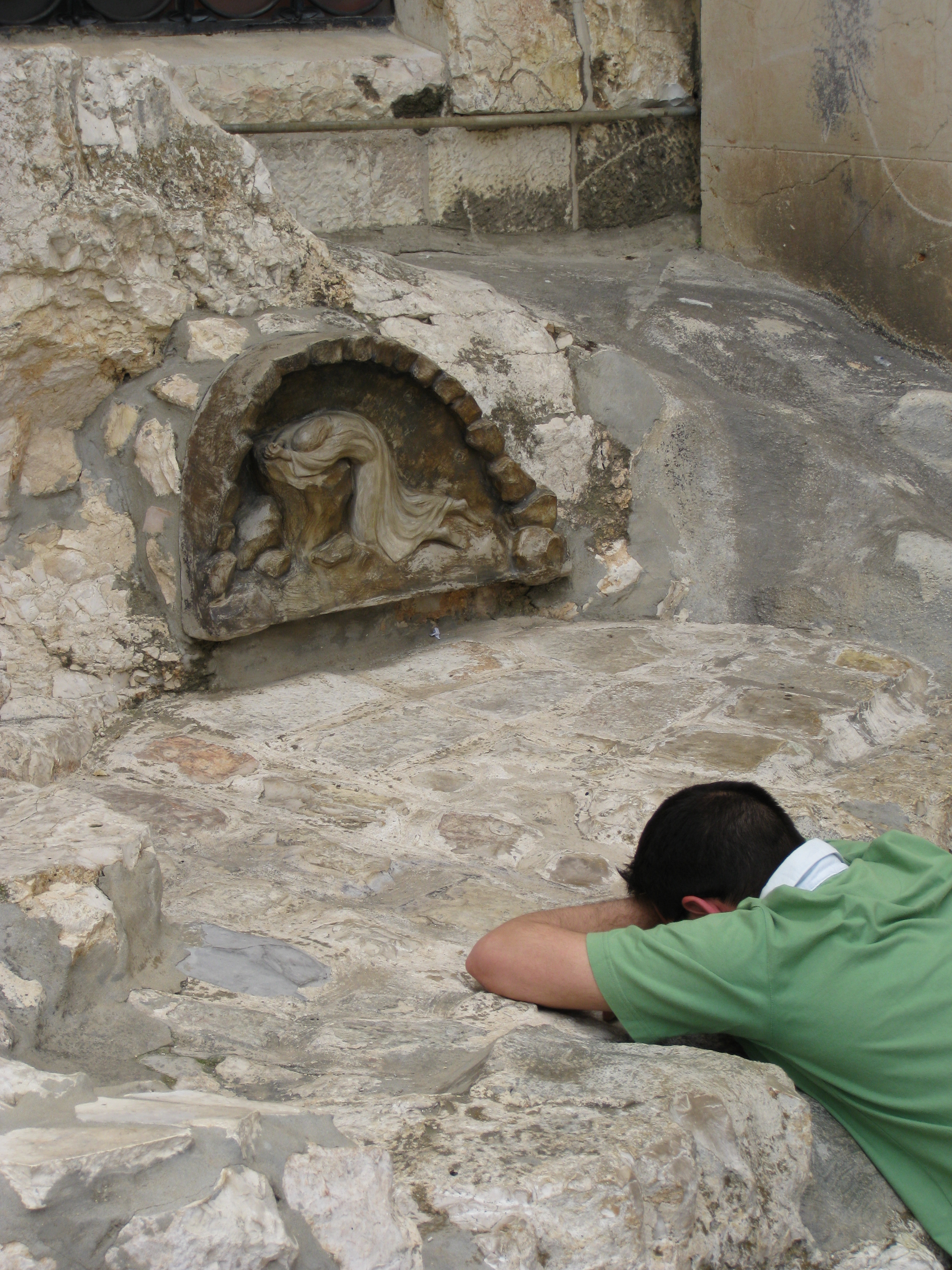 Church of All Nations כנסיית כל העמים